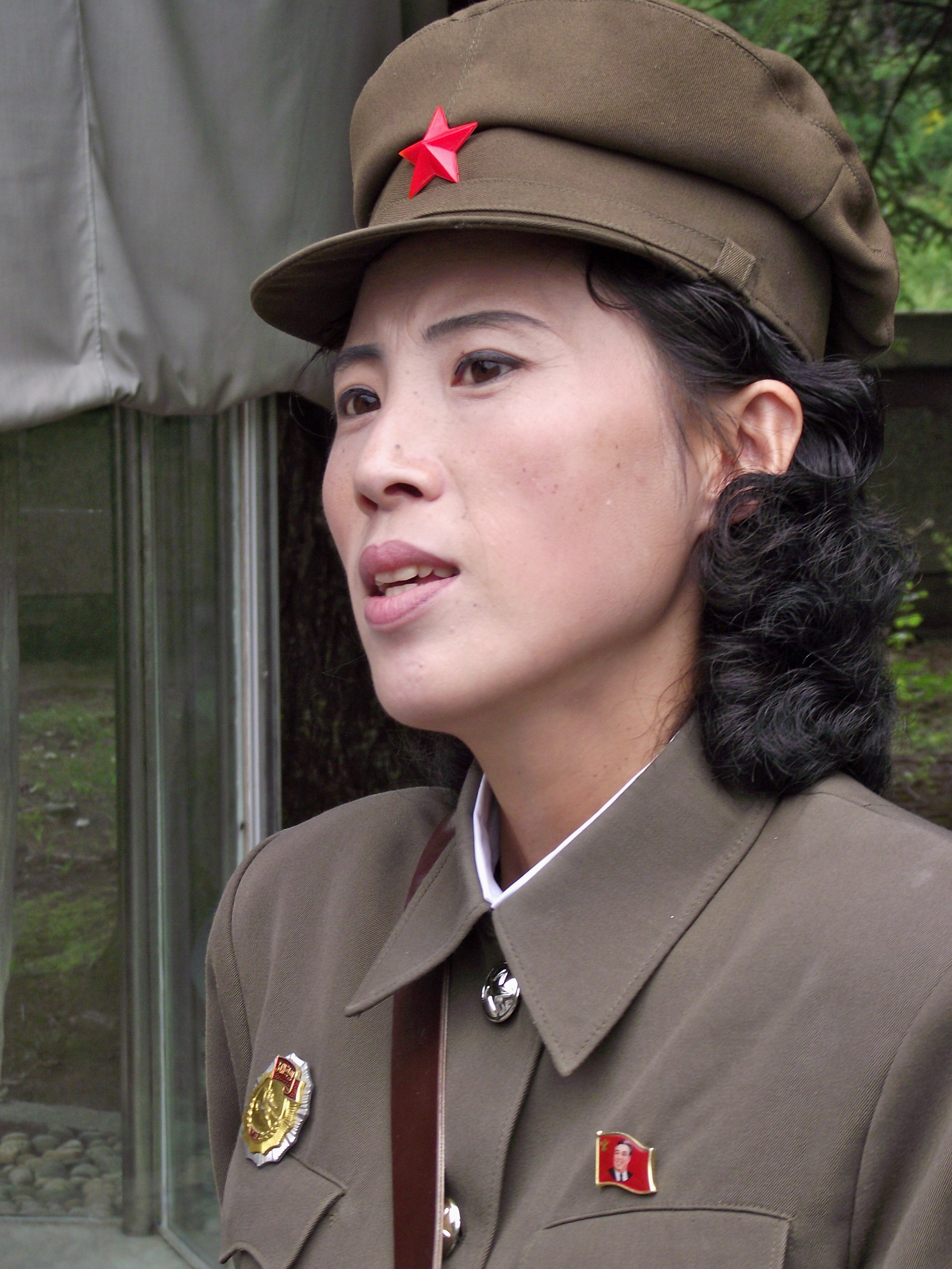 中文（台灣）: 朝鮮民主主義人民共和國的旅遊景點軍事解說員。